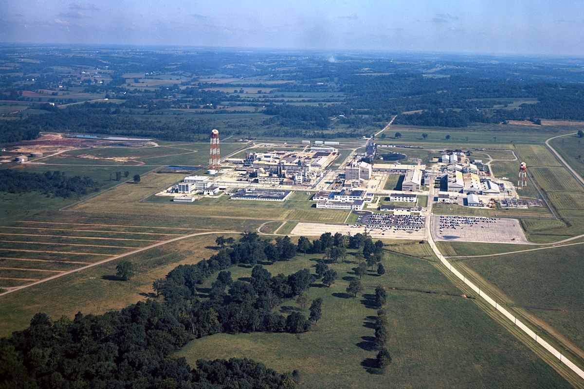 Fernald (before)